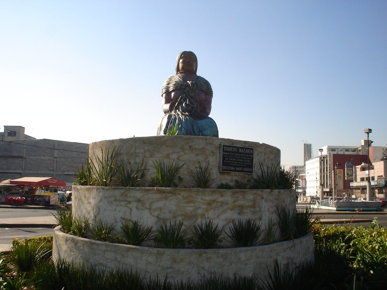 MONUMENTO A LOS MAZAHUAS viven en varias ciudades